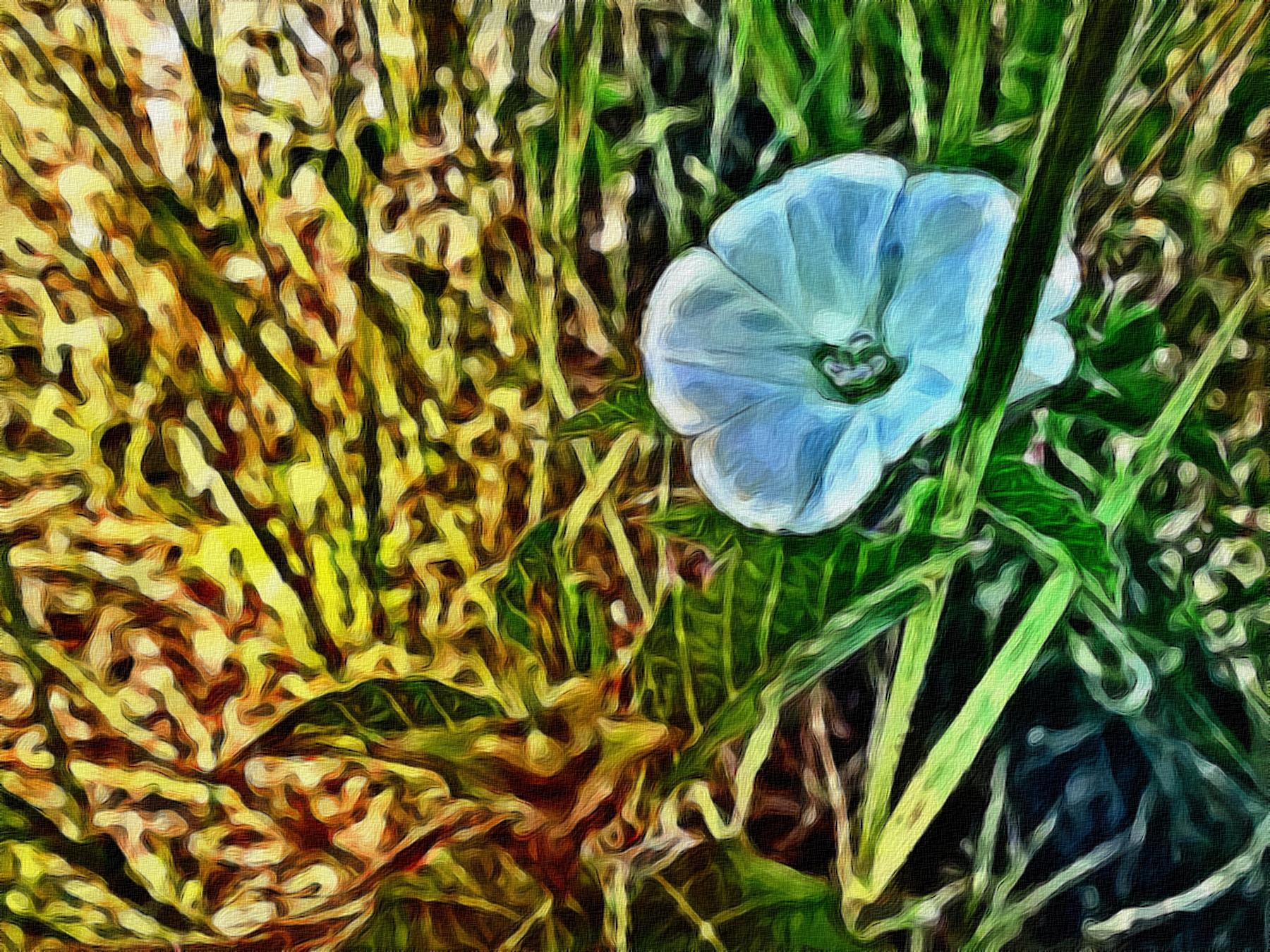 Muestra de pintura digital realizada con el uso de las nuevas tecnologías informáticas, que trata de recrear una técnica o estilo de pintura